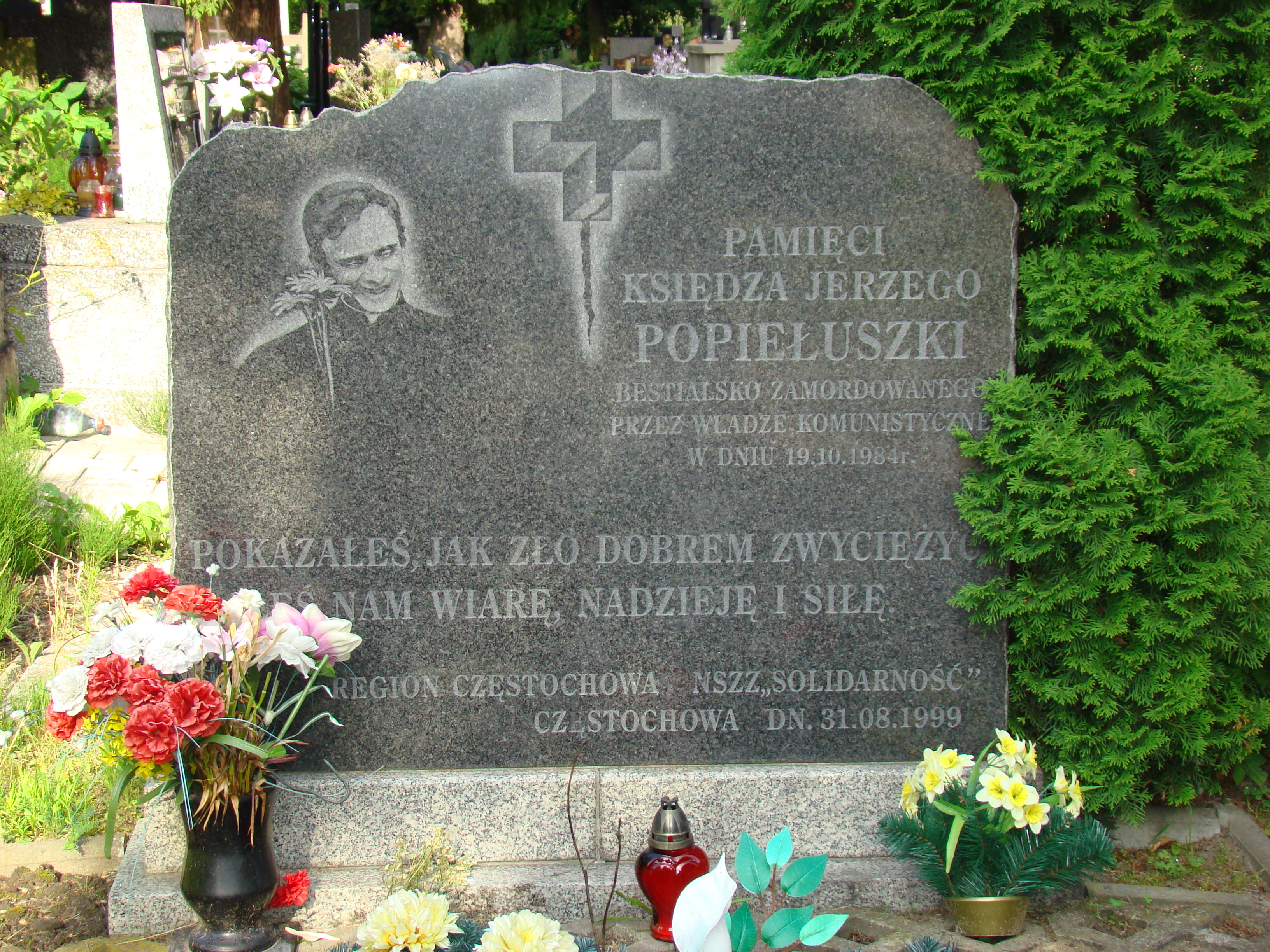 Symboliczny grób ks. Jerzego Popiełuszki, cmentarz Kule w Częstochowie.